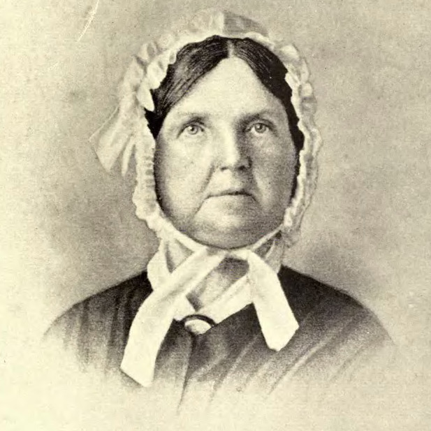 Vol. 3